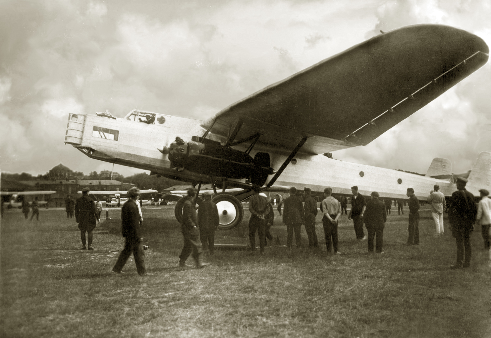 Опытный бомбардировщик ТБ-5 на Центральном аэродроме. На заднем плане слева три опытных истребителя И-5 у ограды ЦКБ-39 ОГПУ. 6 июля 1931 г. (Grigorovich TB-5 with three old I-5 fighters in the background